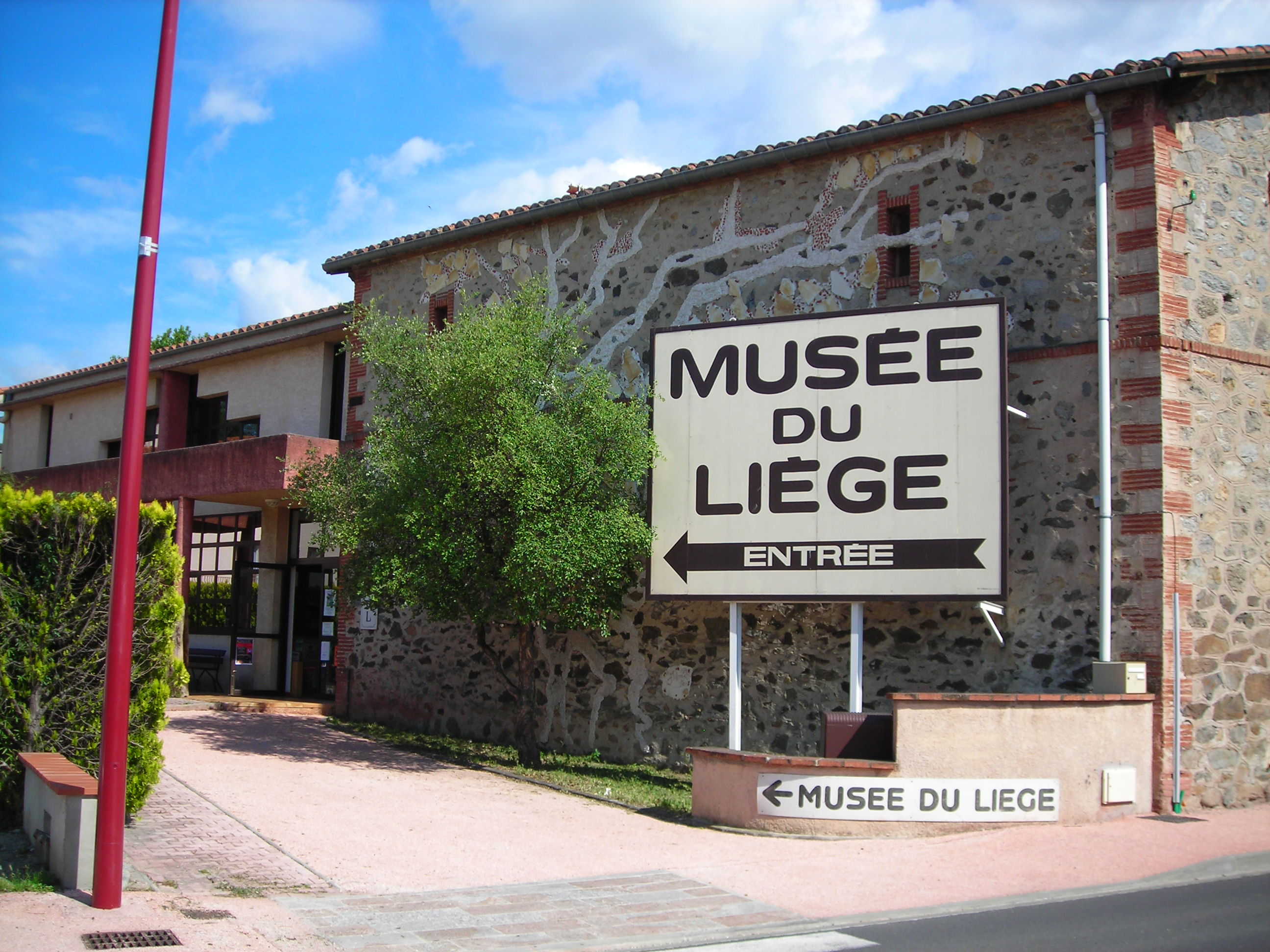 maureillas las illas 66480